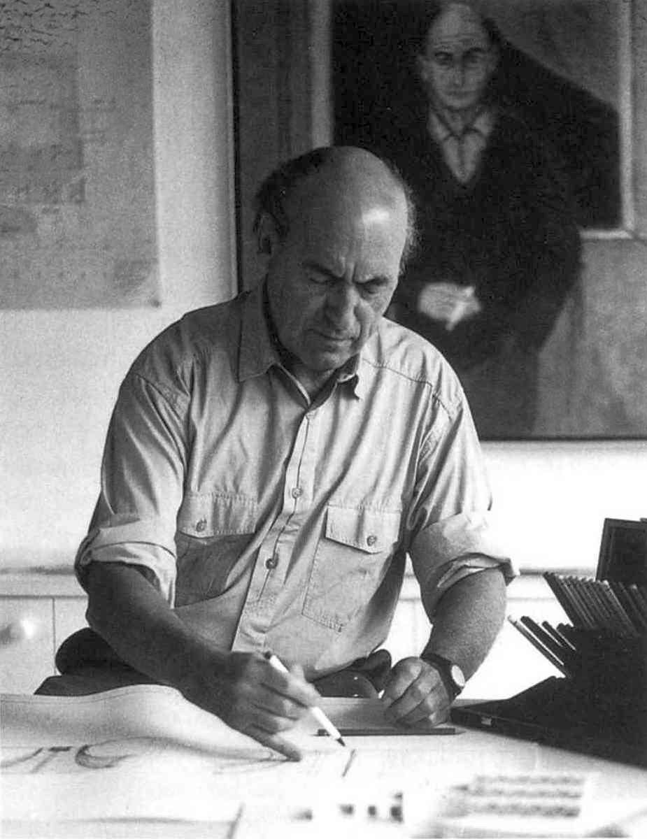 Porträtfoto von Heinz Rall, 2001.